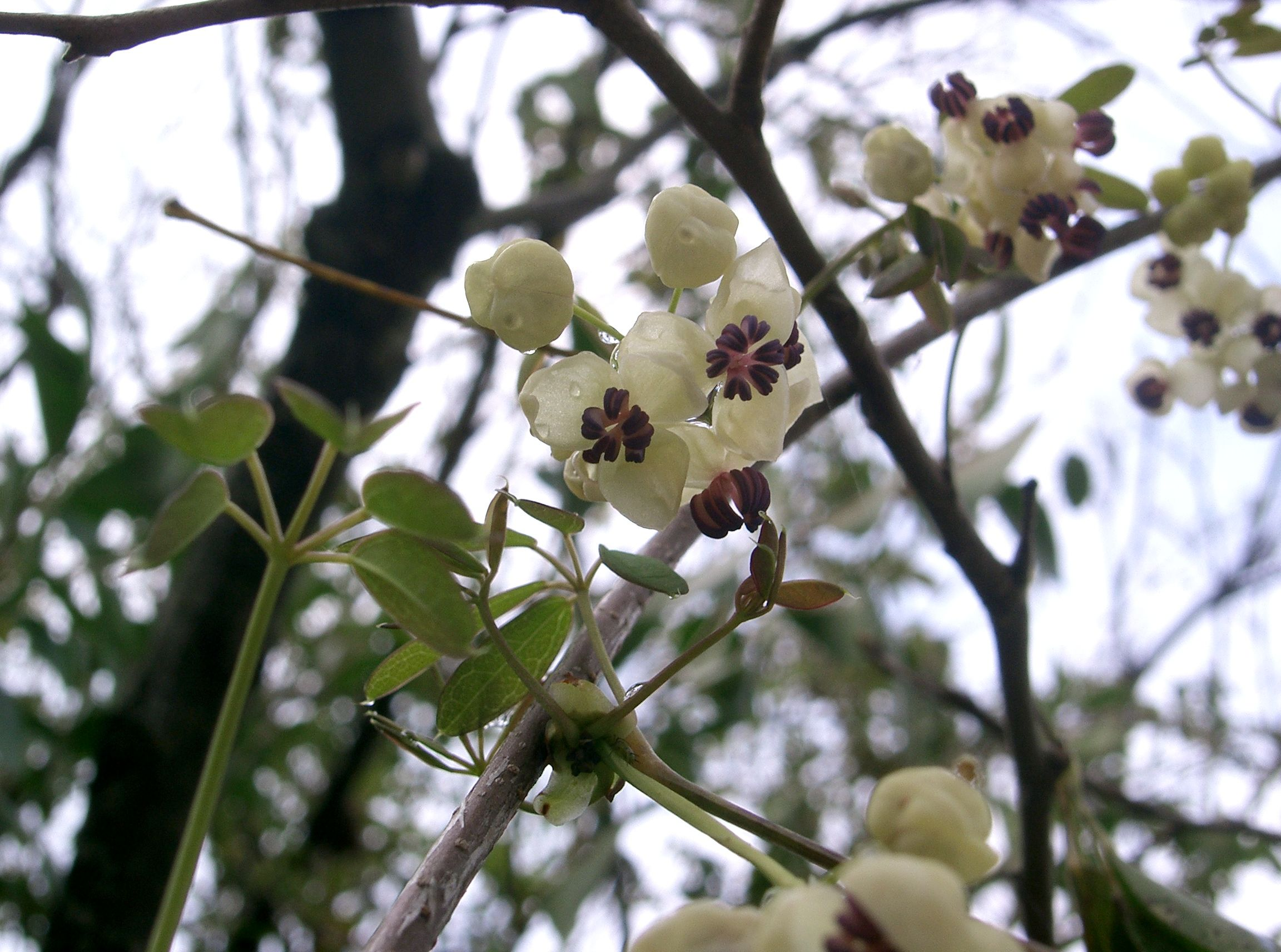 Akebia quinata